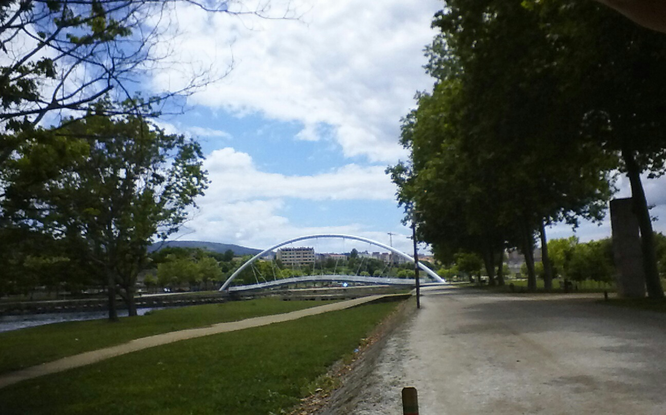 Parque de la Isla de las Esculturas y pasarela peatonal atirantada sobre el Lérez en Pontevedra capital